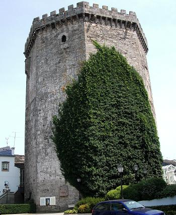 A Torre da Homenaxe do Castelo dos Andrade, en Vilalba. Hoxe, parte un Parador de Turismo. Imaxe tomada o 22/07/05 por user:Agremon. Uploaded by User:Agremon